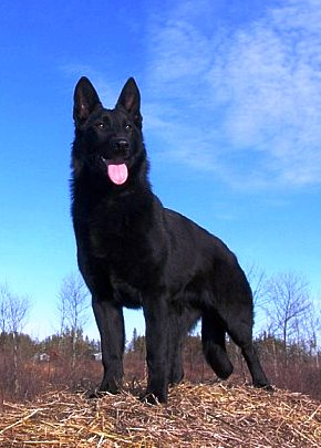 Pastor alemán negro sólido